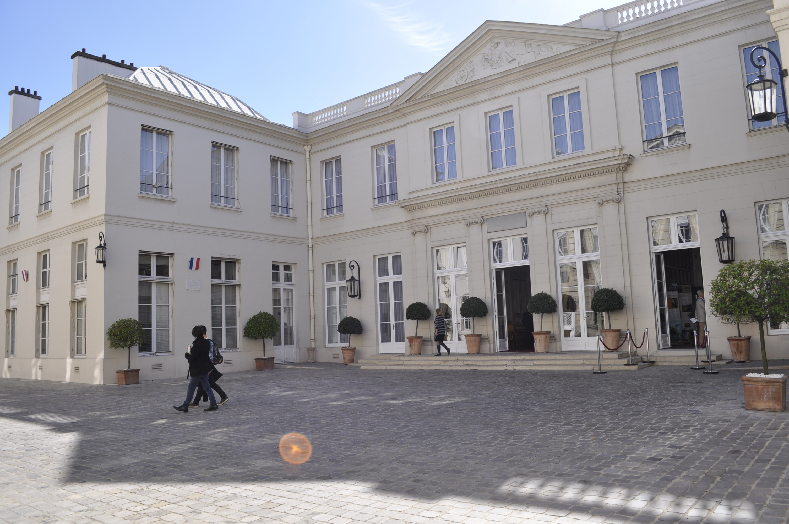 Cour de l'hôtel de Montmorin. Photo prise lors des journées européennes du patrimoine 2015 .